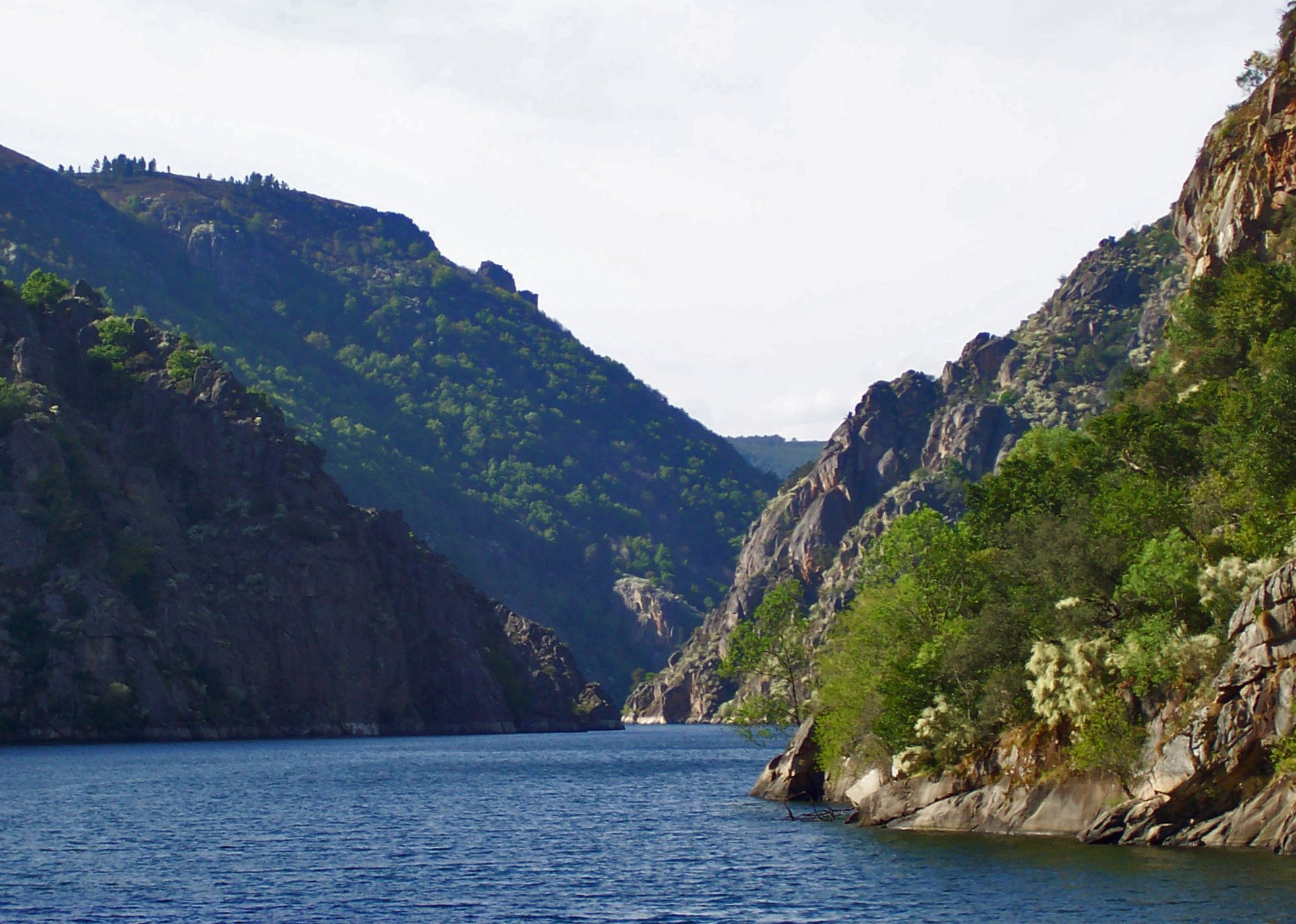 Cañón do Sil